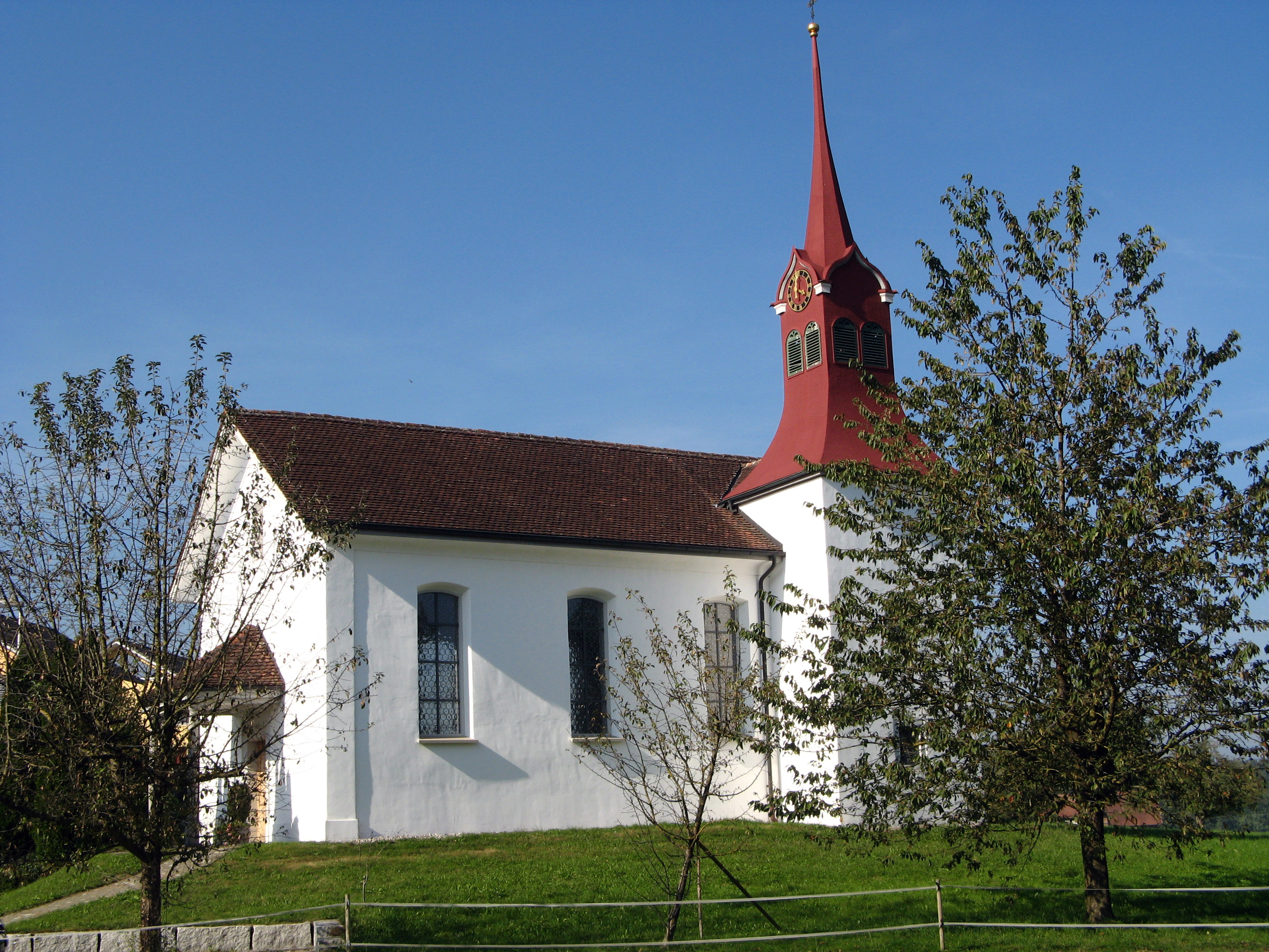 Kapelle St. Wendelin in Fenkrieden bei Sins, Aussenansicht